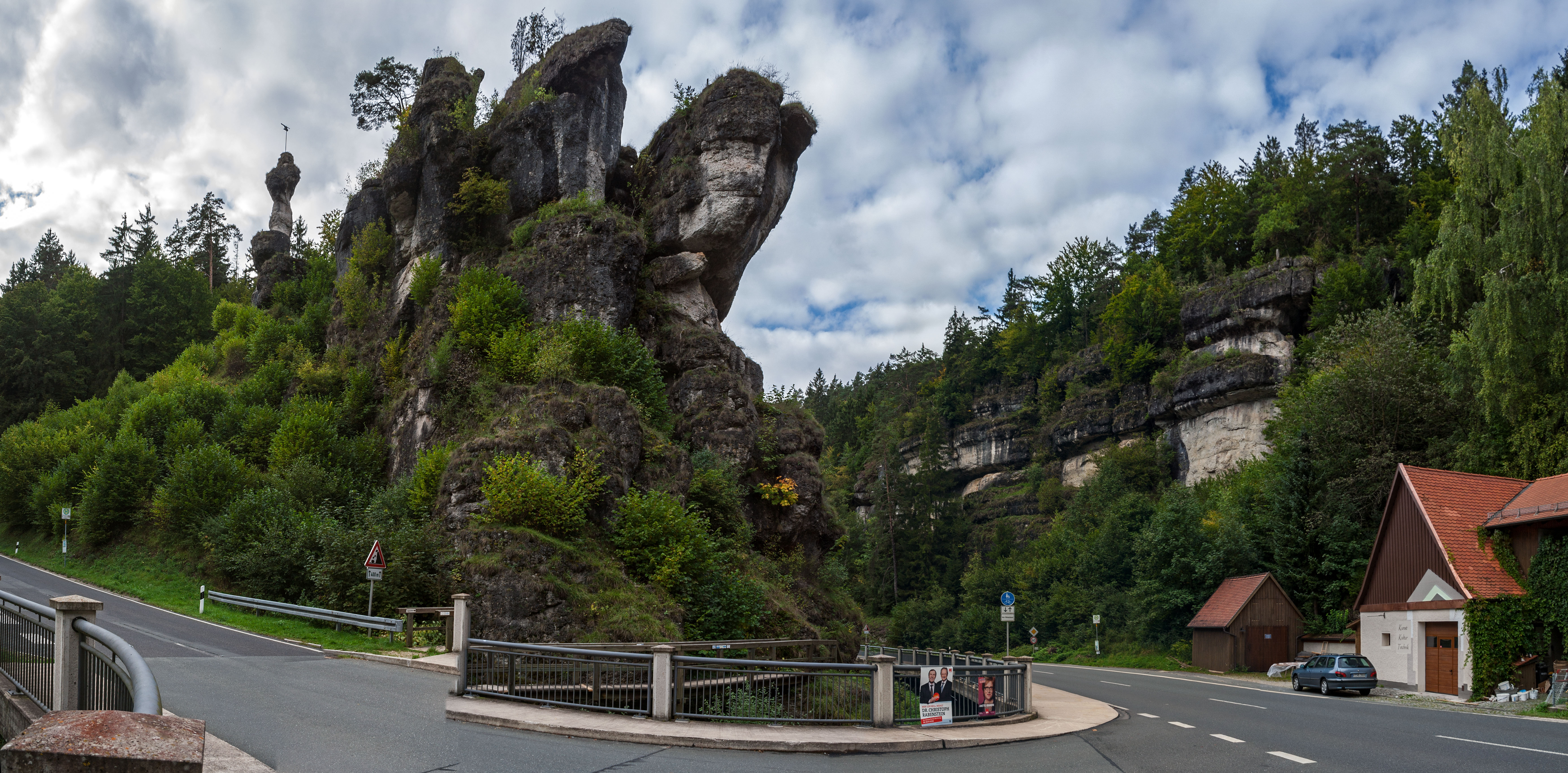 Weihersbacher Männchen, Schüttermühle